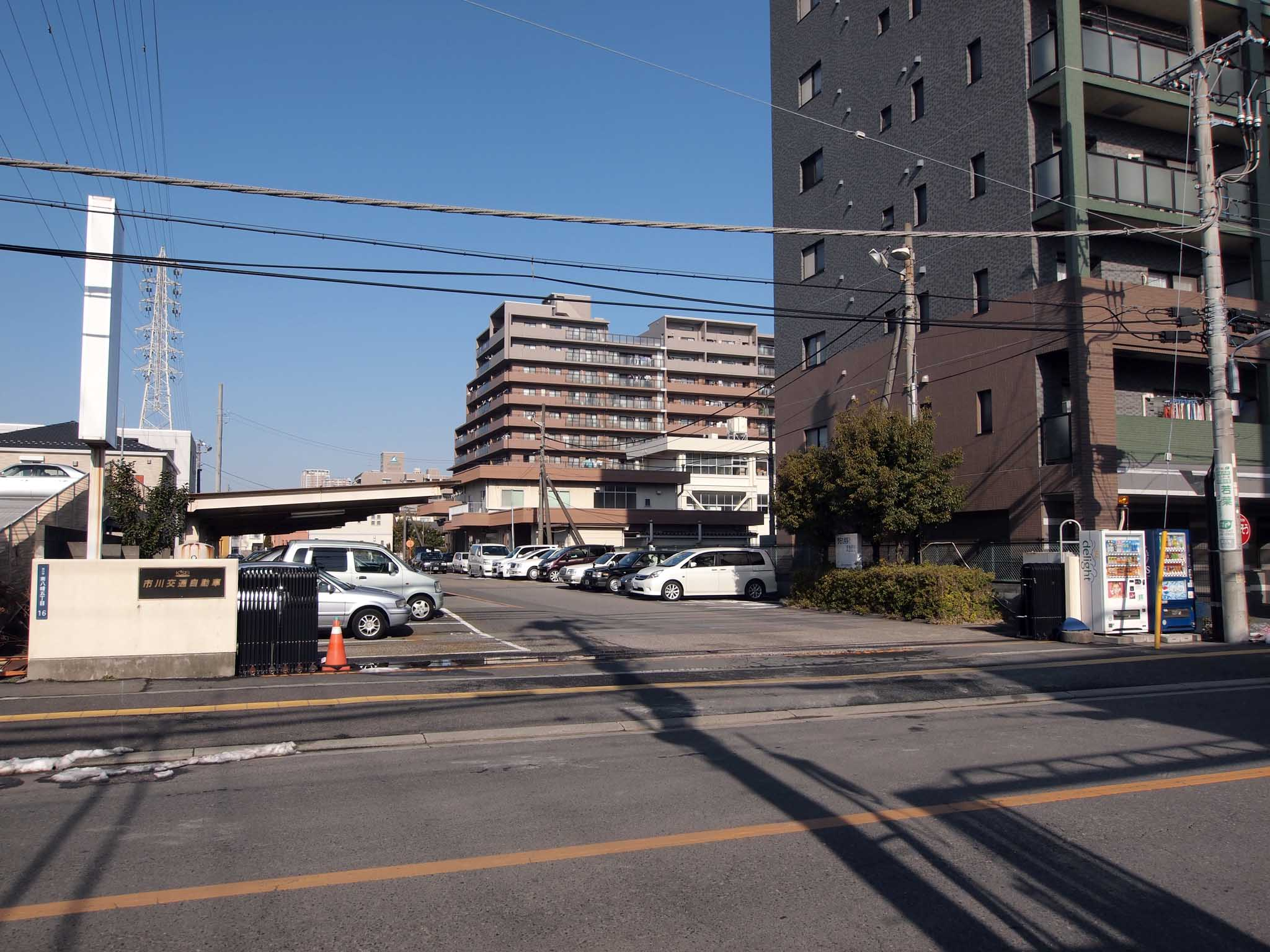 京成グループのタクシー会社、市川交通自動車の本社営業所。本八幡駅南口を発着する京成トランジットバスの操車所としても使用される。